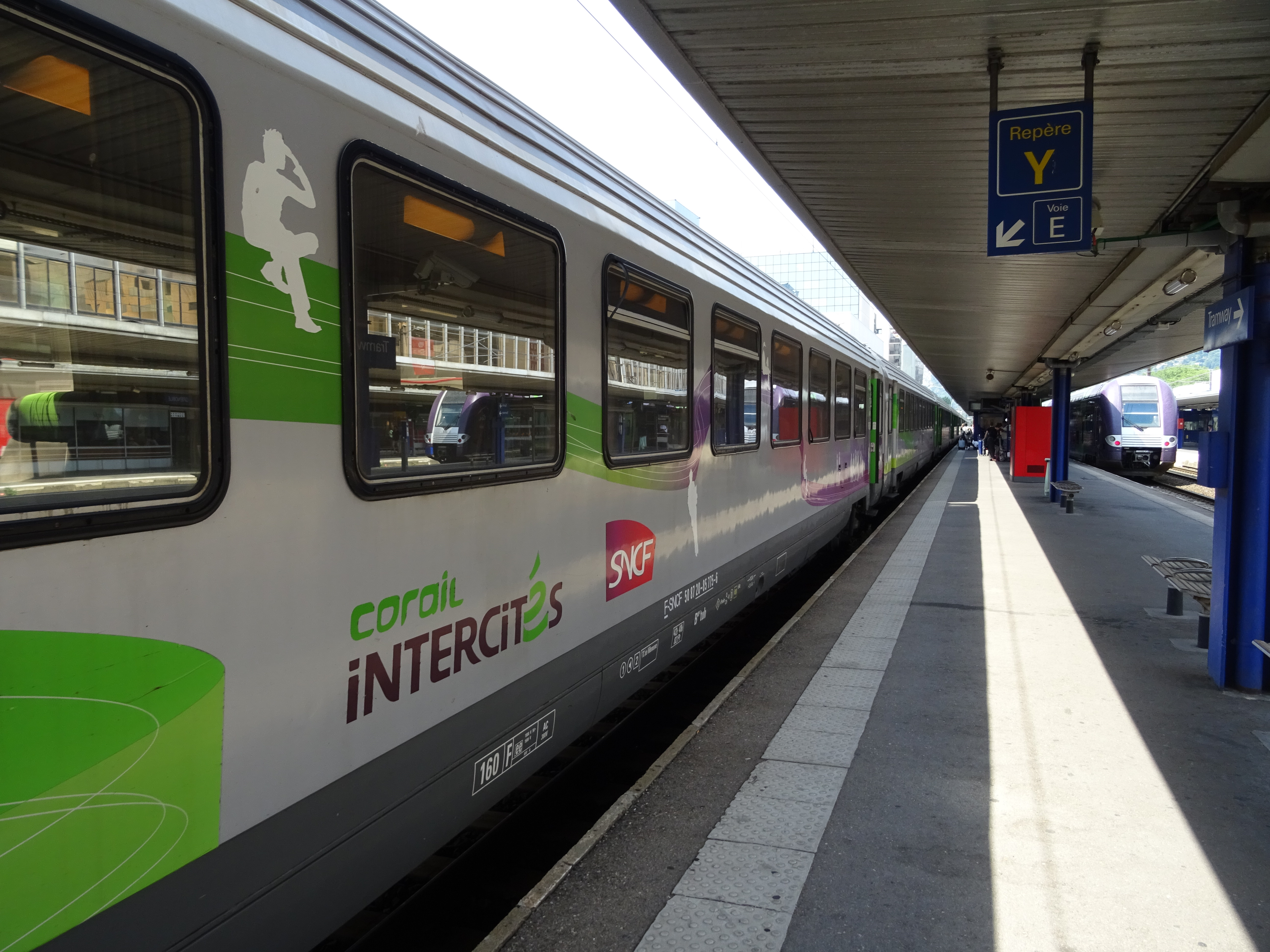 Voiture de l'IC 100% éco Paris-Bercy - Grenoble à Grenoble.